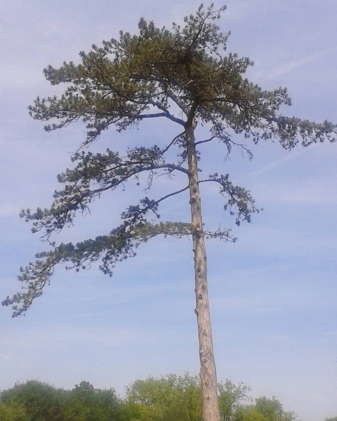 arbre, château de Chaumont